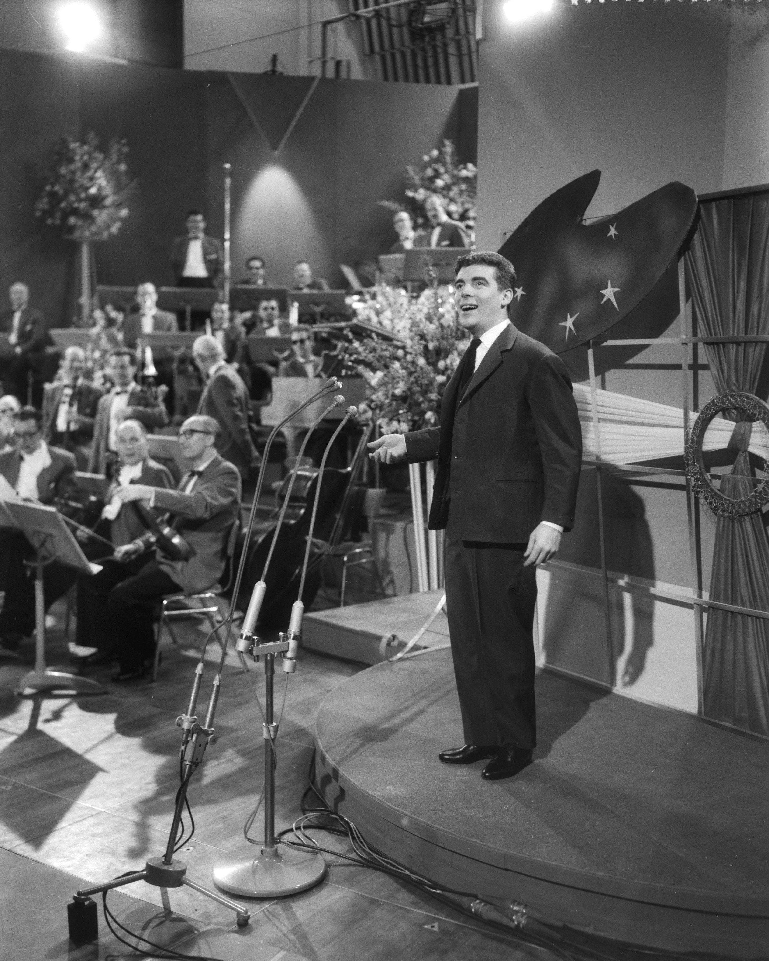 Collectie / Archief : Fotocollectie Anefo Reportage / Serie : [ onbekend ] Beschrijving : Eurovisie Songfestival. Fud Leclerc (Belgie) Datum : 11 maart 1958 Locatie : Hilversum Trefwoorden : songfestivals, zangers Persoonsnaam : Leclerc Fud Fotograaf : Pot, Harry / Anefo Auteursrechthebbende : Nationaal Archief Materiaalsoort : Negatief (zwart/wit) Nummer archiefinventaris : bekijk toegang 2.24.01.04 Bestanddeelnummer : 909-4002